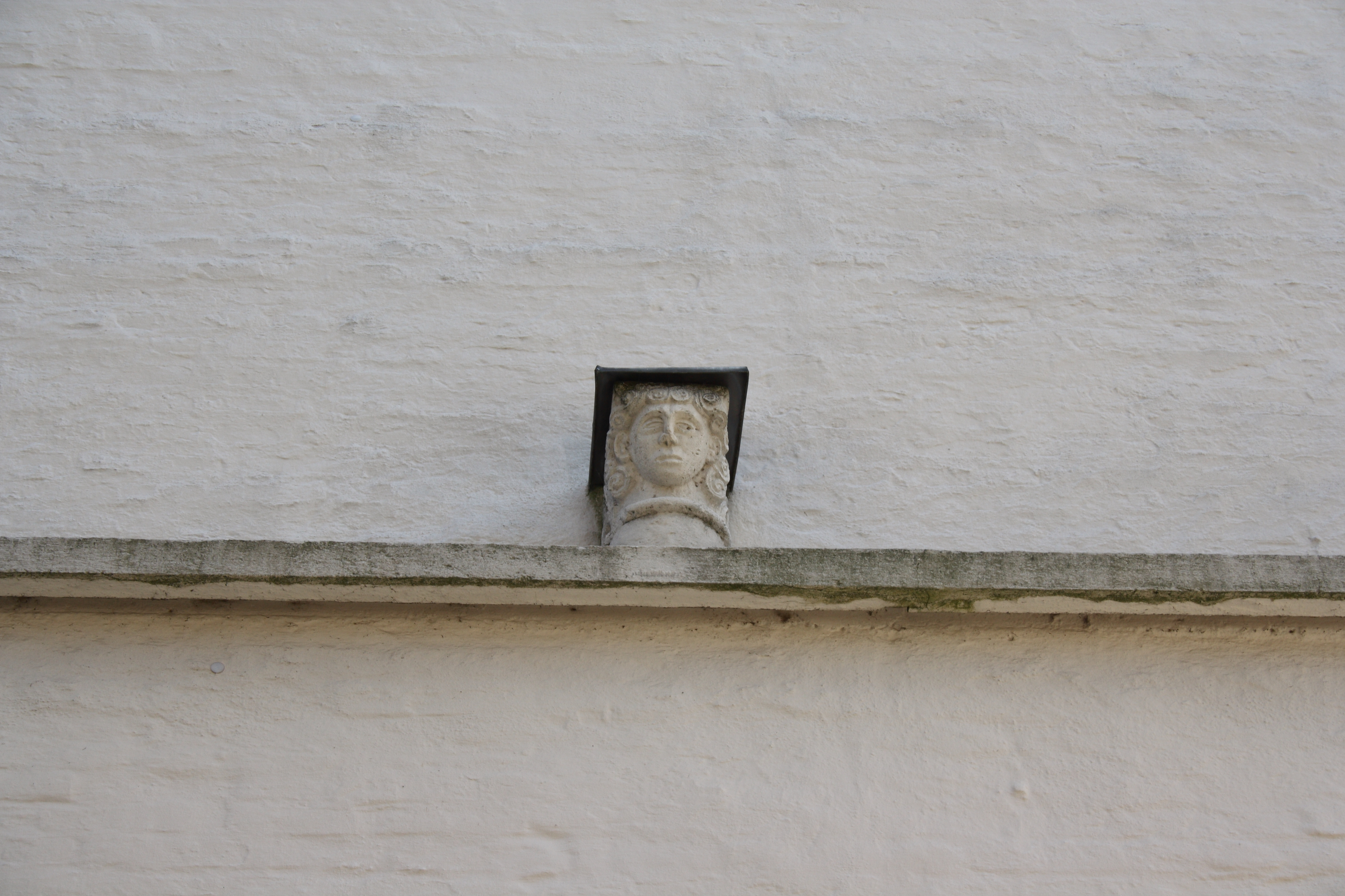 katholische Stadtpfarrkirche St. Martin in Gundelfingen an der Donau